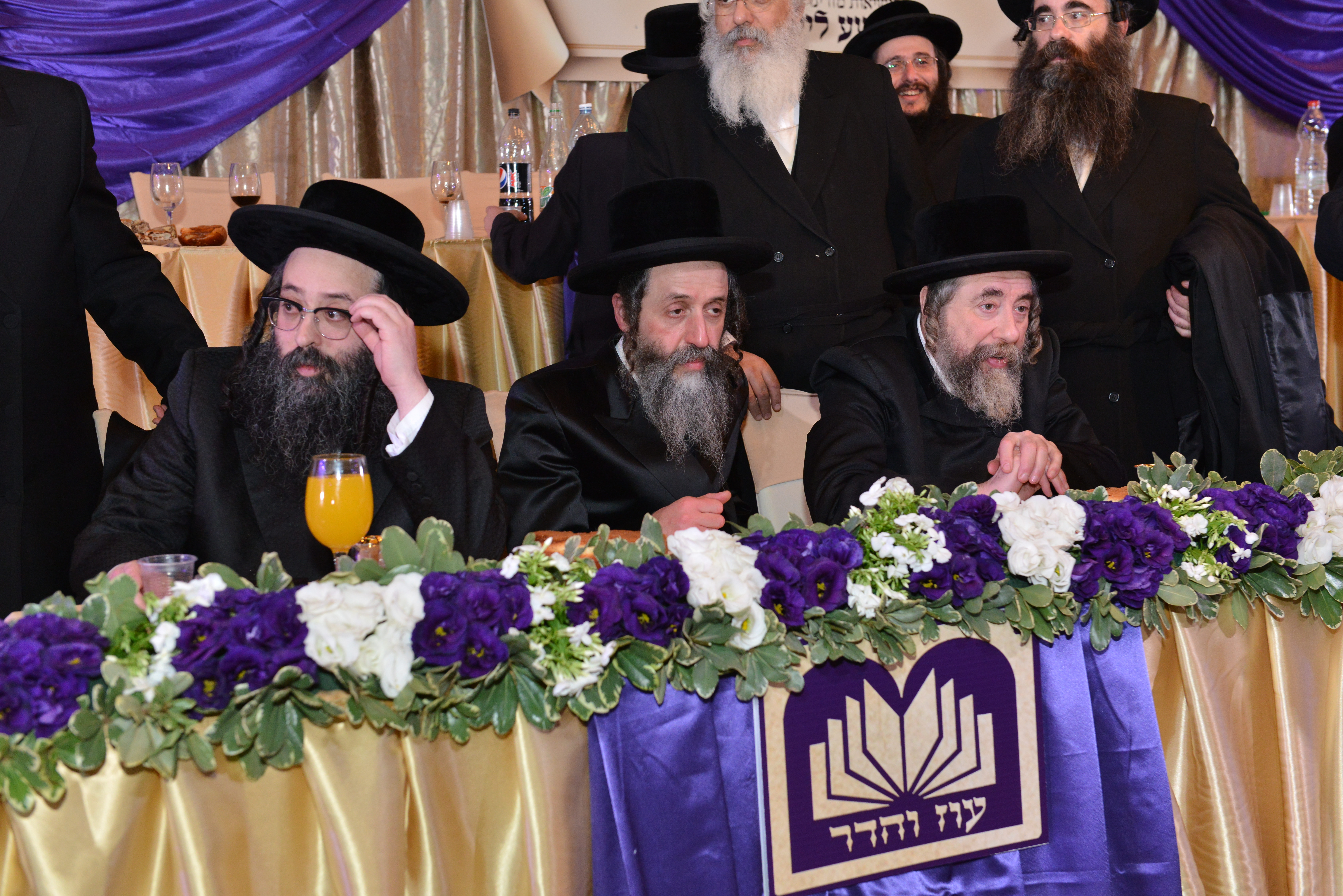 מימין לשמאל: האדמו"ר מרחמטריוסקא הרב יהושע לייפער, הרב חיים צבי מייזליש ראש ישיבת מהרי"ט של סטמר בבני ברק